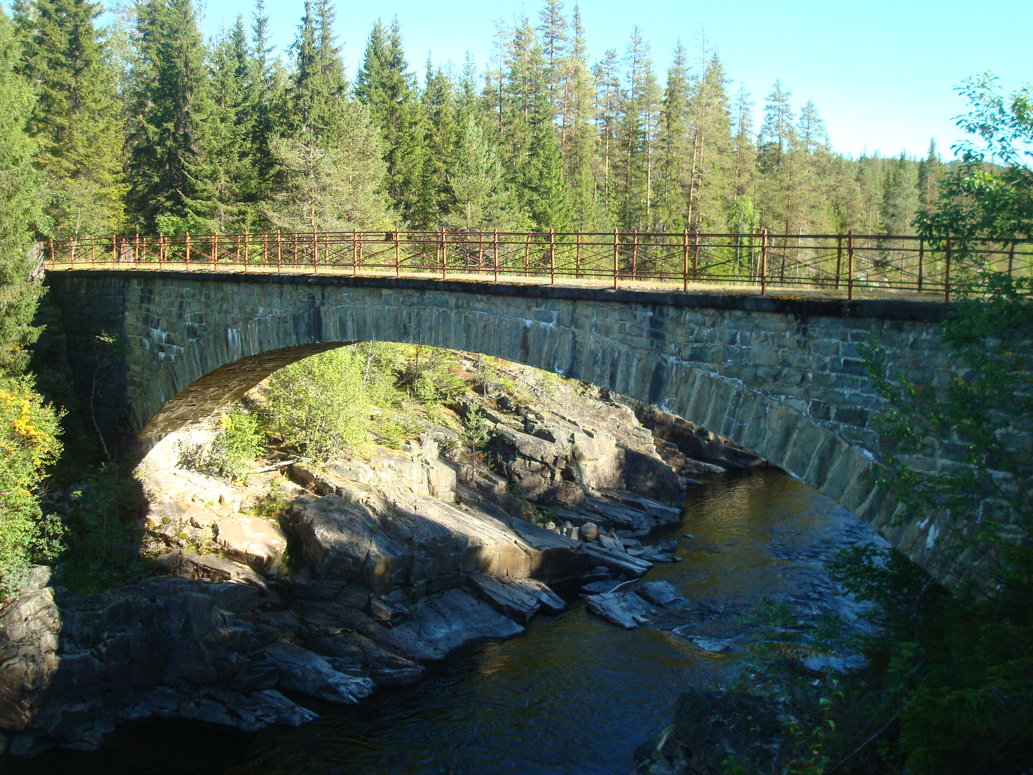 Gamle Grønvold bru i Torpa